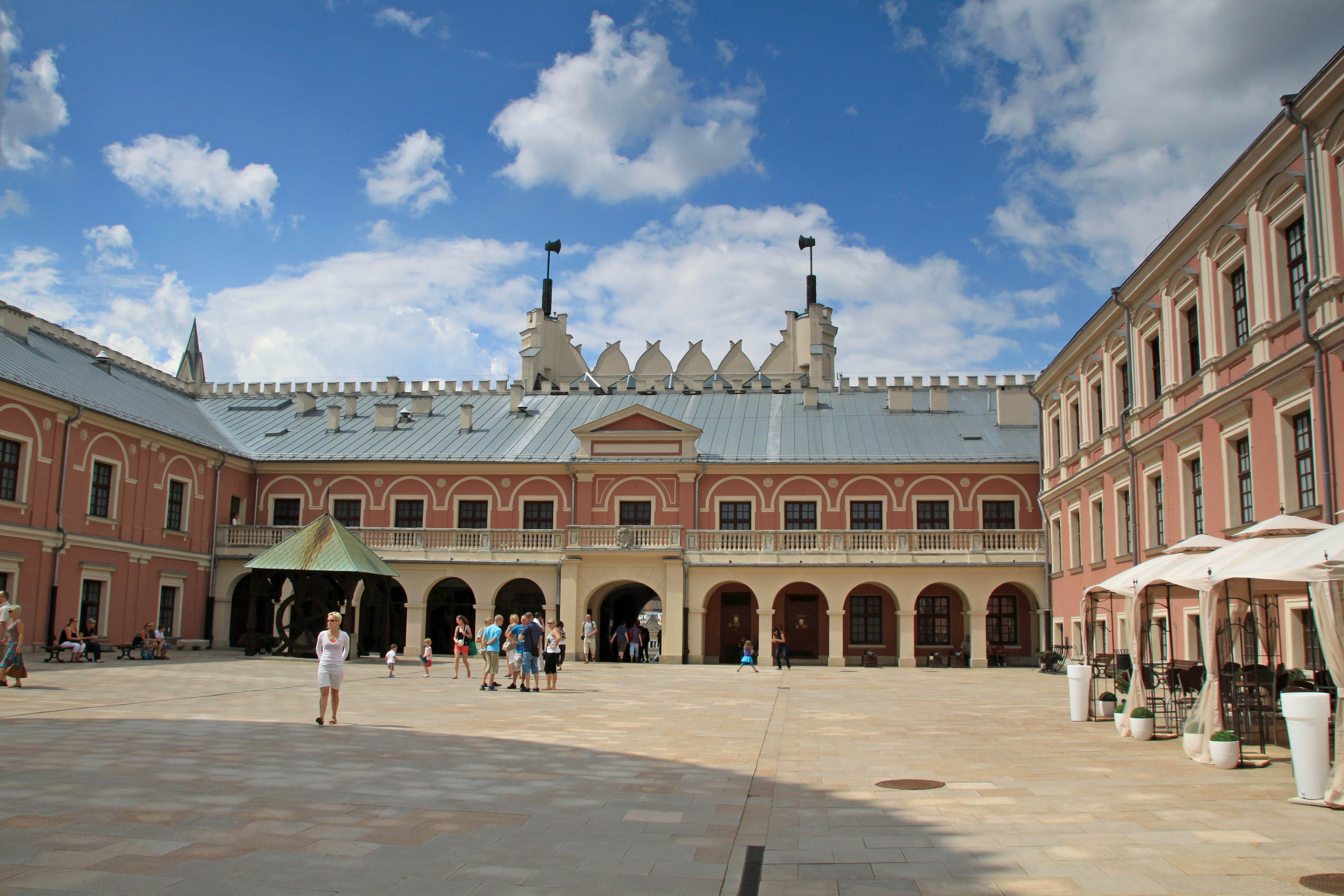 Lublin, fragment muru obwodowego z basztą